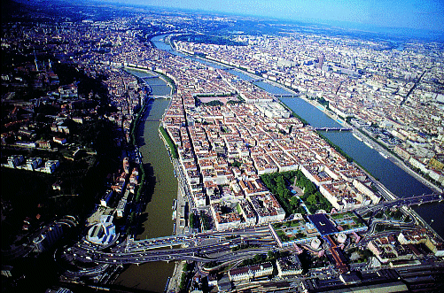 Lyon vue du ciel